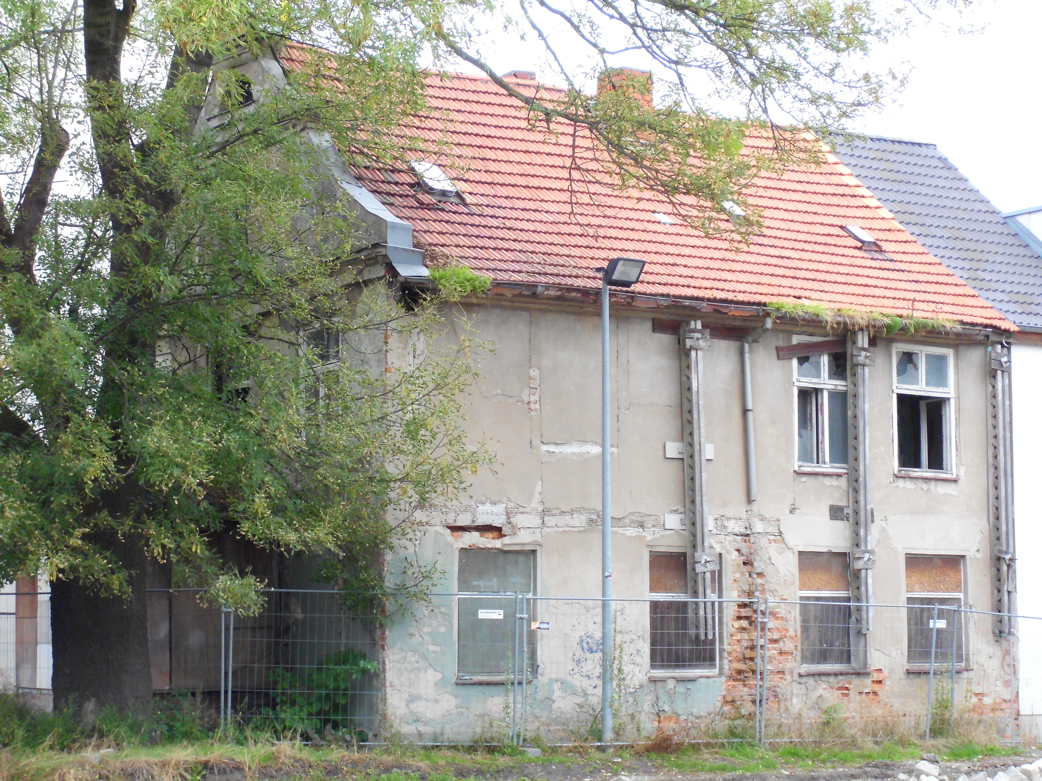 unsaniertes Haus, Frankenwall 23